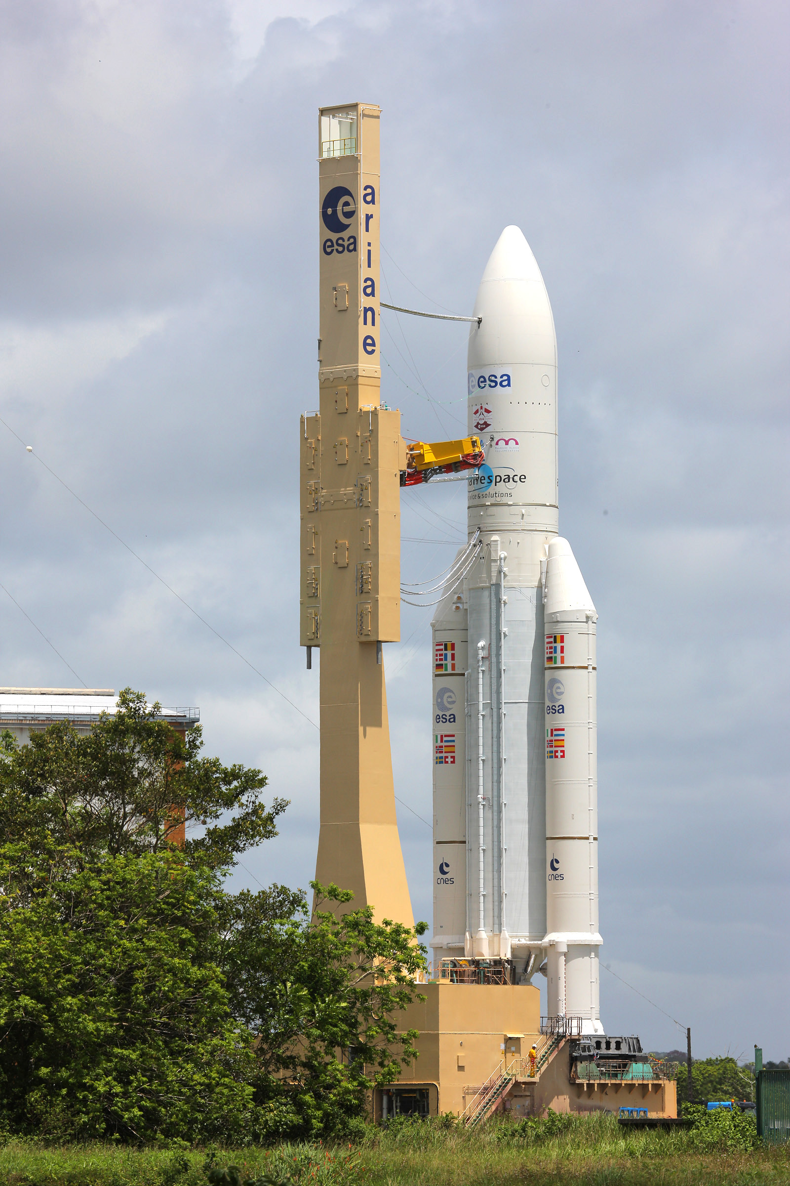 Raumfrachter ATV-4 "Albert Einstein" Ariane 5ES mit "OCAM"-Kamerasystem Gemeinsam mit Partnern hat das DLR in den vergangenen Jahren das On-Board-Kamerasystem "OCAM" entwickeln lassen, mit dem sich der Flug der Ariane-Rakete verfolgen lässt. Das OCAM-System ist eine eigenständige Komponente, die auf der Ariane 5 als Passagier mitfliegt. Der Höhepunkt des OCAM-Einsatzes wird die Beobachtung des Absetzens von ATV-4 im Orbit sein. Für dieses Ereignis wird OCAM dreidimensionale Video-Sequenzen aufnehmen, um das dynamische Verhalten der Raumfahrzeuge während der Separationsphase zu studieren. Damit eröffnet sich für die Ingenieure des ATV-Projekts eine völlig neue Möglichkeit, den Erfolg ihrer Arbeit zu beobachten und zugleich für die Zukunft wichtige neue Erfahrungen zu sammeln. Credit: DLR/Thilo Kranz (CC-BY 3.0) 2013